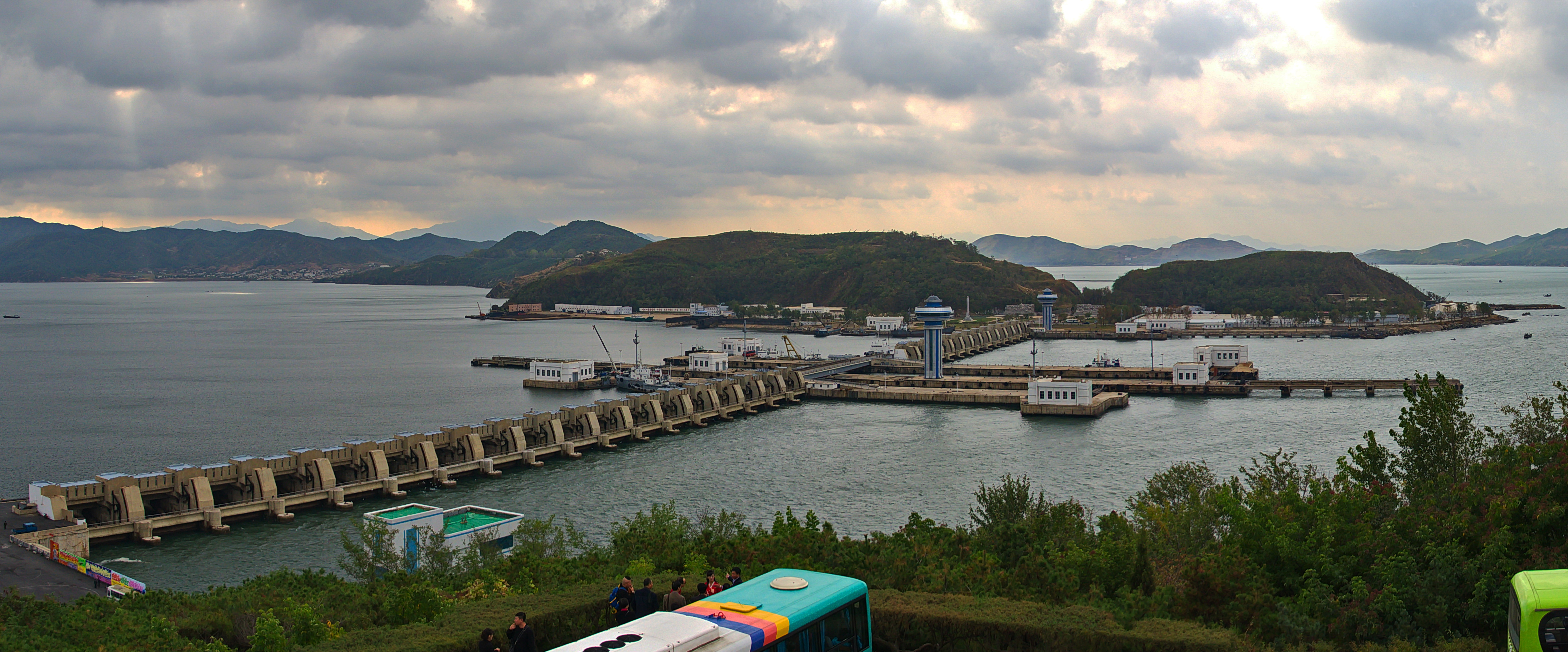 Nordkorea 2015 - Westmeer Sperrwerk